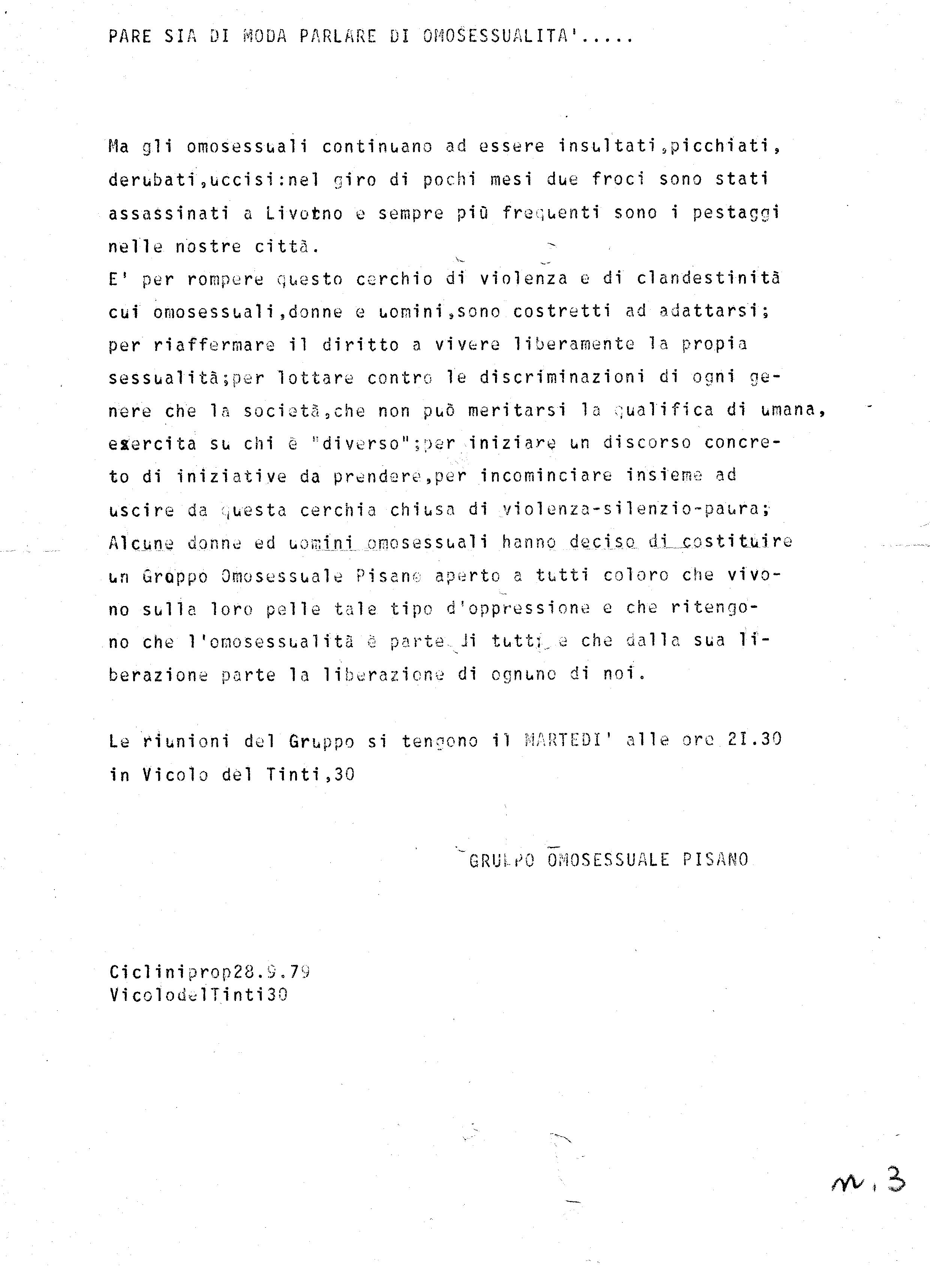 Volantino di presentazione Collettivo Orfeo